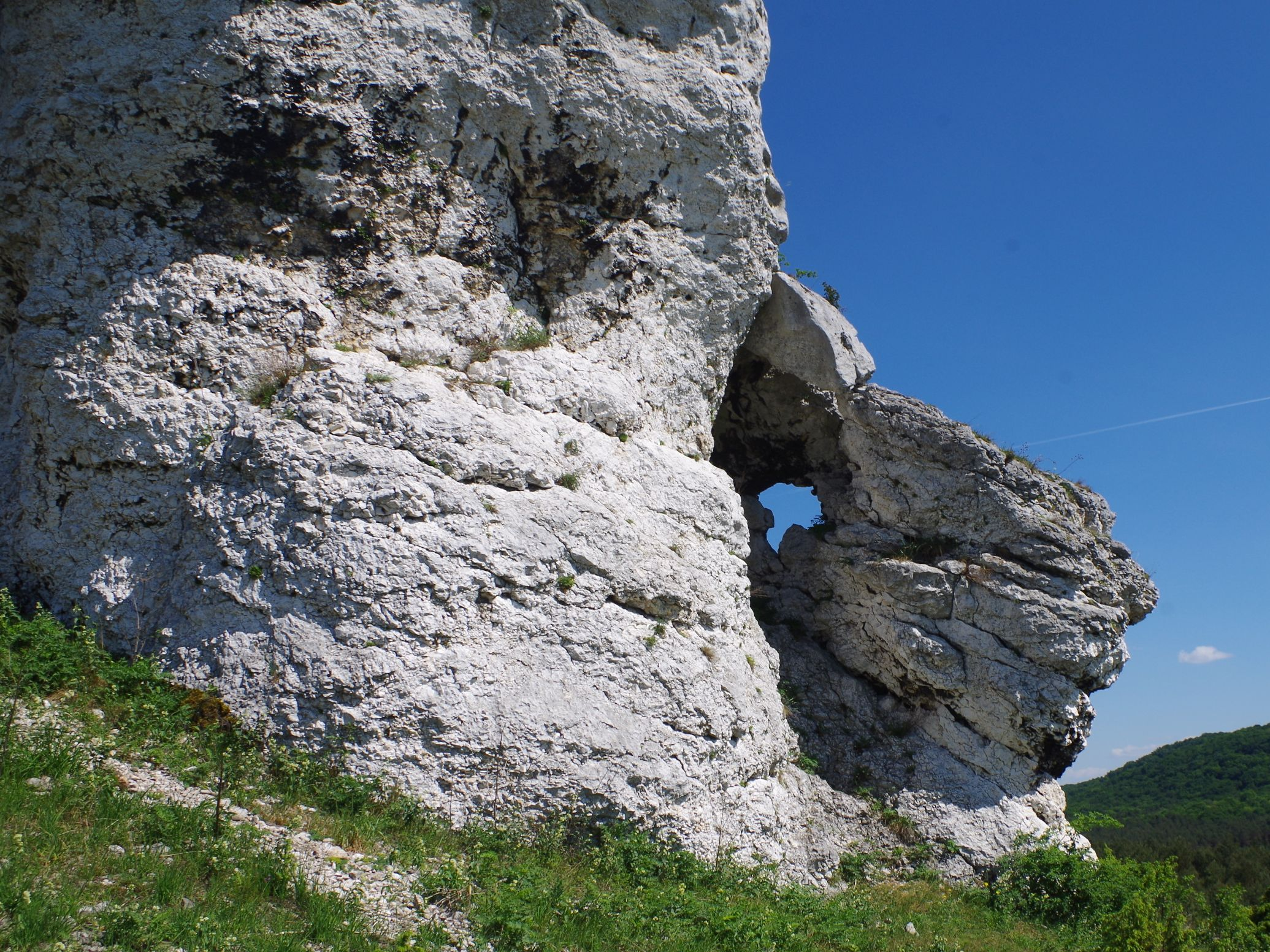 Skała Z Jałowcem na wzgórzu Biakło